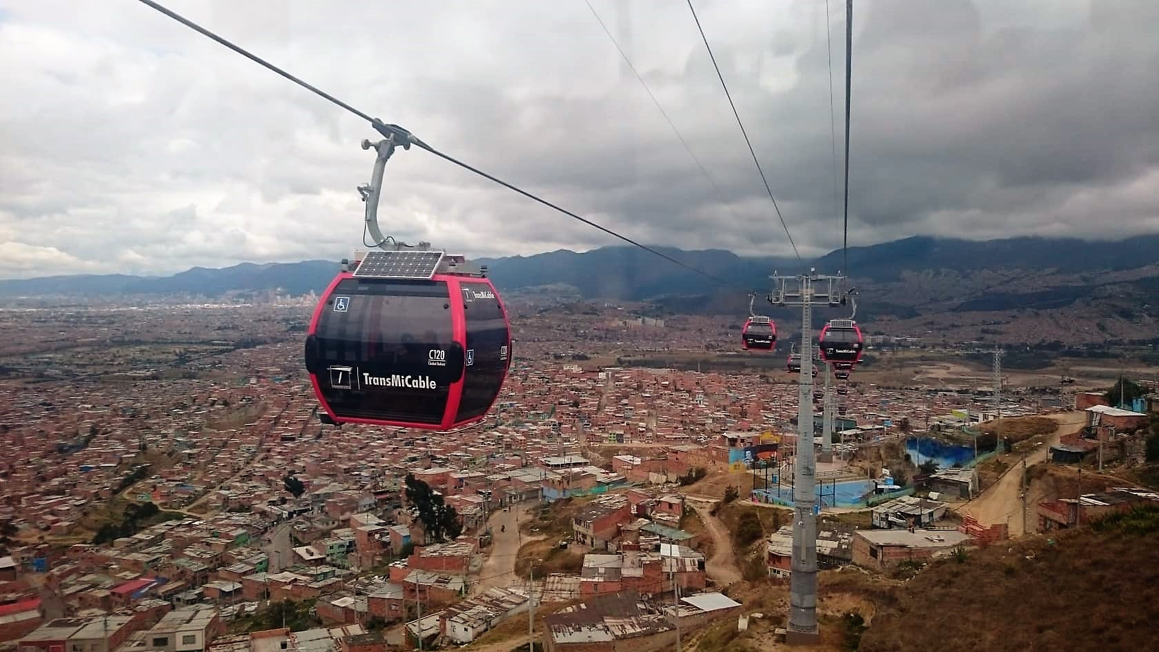 TransMiCable